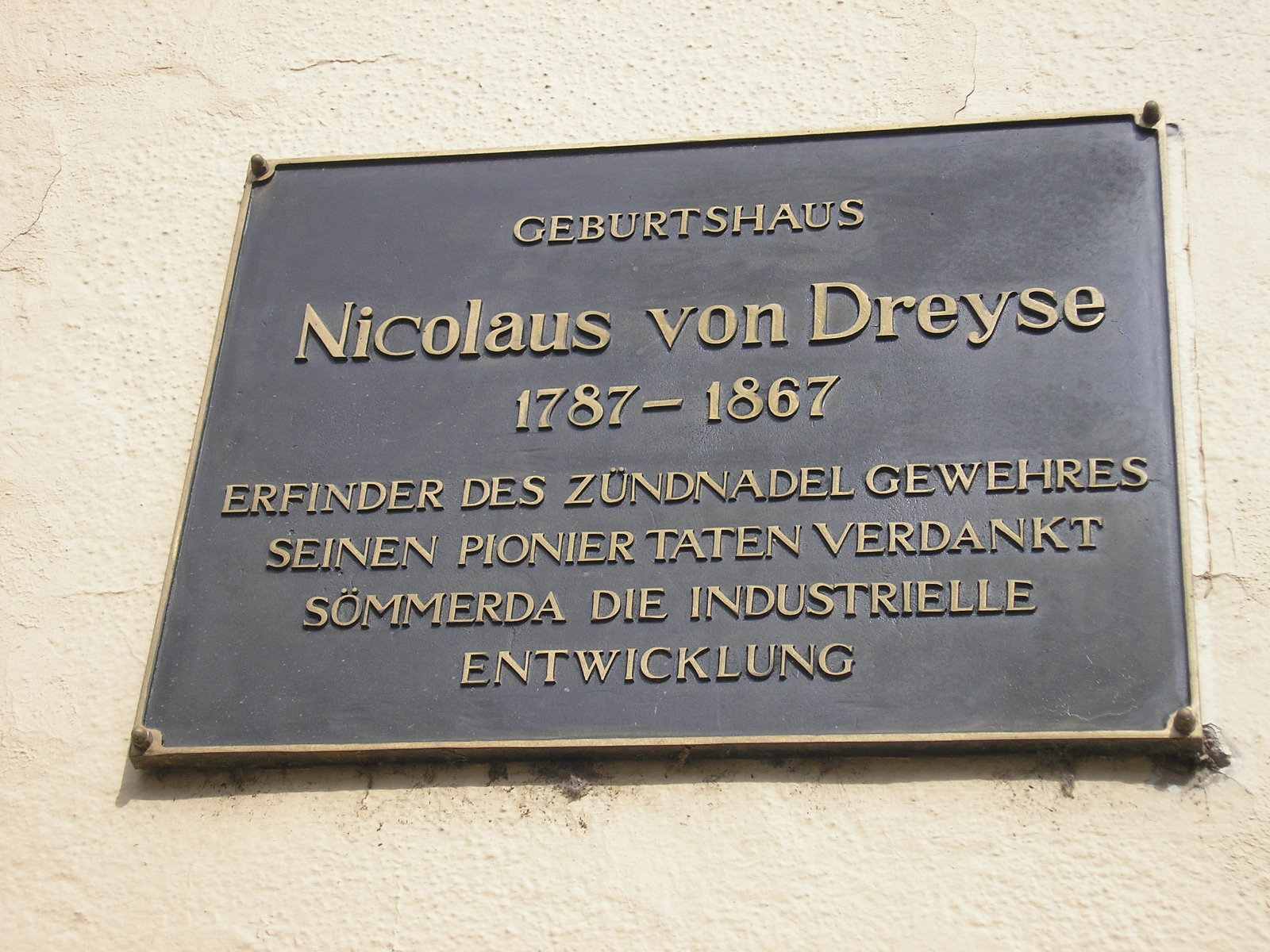 Gedenktafel am Geburtshaus des Johann Nikolaus von Dreyse in Sömmerda (Thüringen).